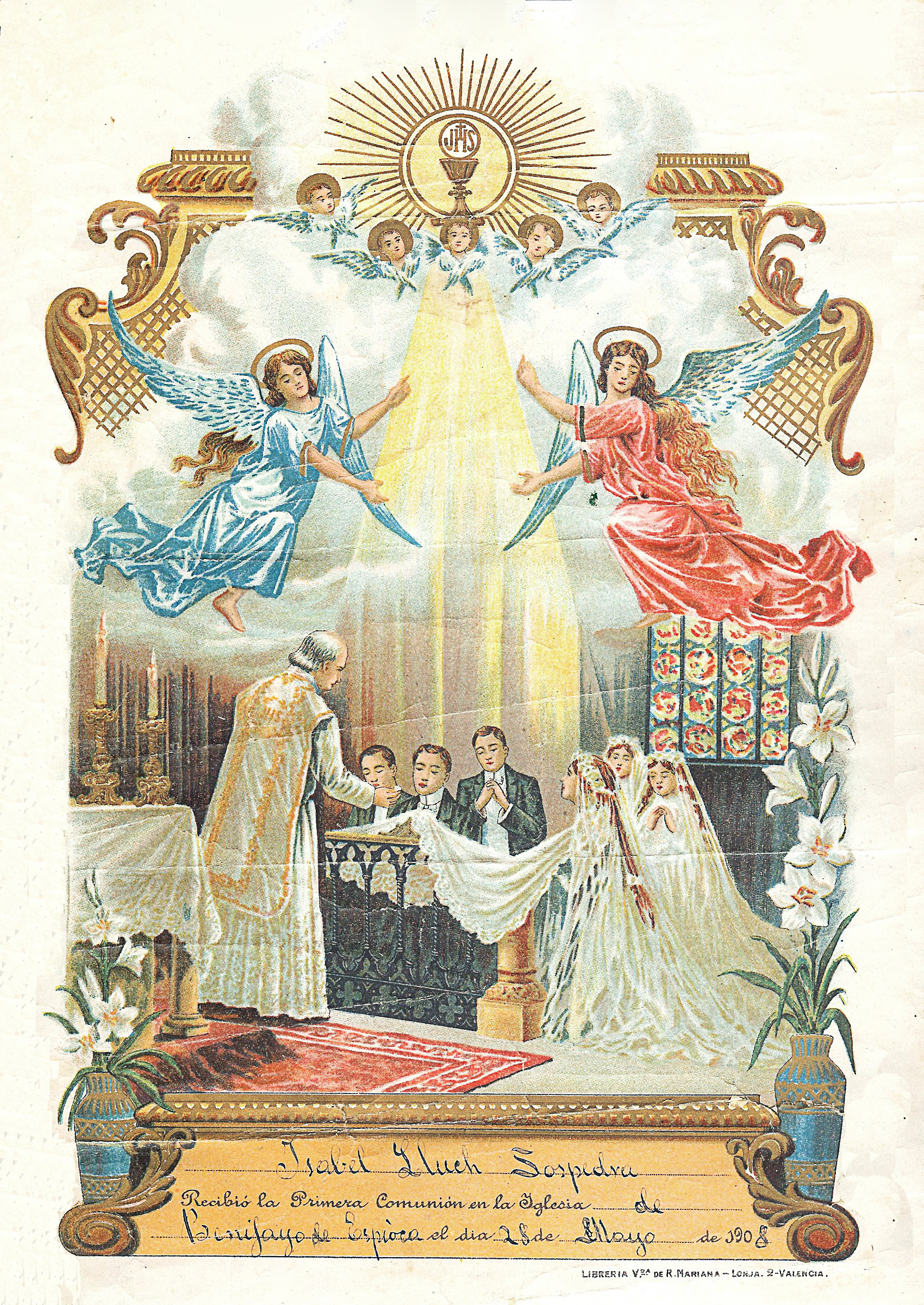 Primera Comunion en la iglesia de Benifayo de Espioca 28 de Mayo 1908 Tiene un tamaño casi de folio